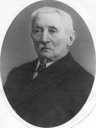 František Josef Andrlík (1852 - 1939), Český učitel, spisovatel a překladatel.